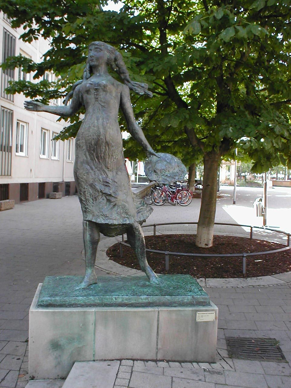 Käthchenfigur in Heilbronn. Entworfen von Dieter Läpple 1965. Die Bronzefigur war einst ein Teil des Käthchenbrunnens.